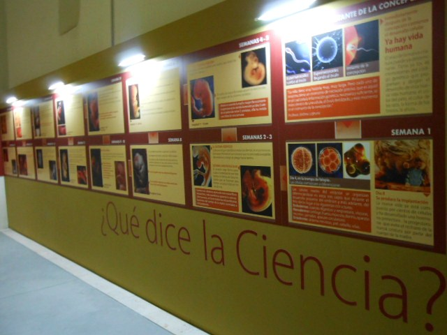 Panel: ¿Qué dice la ciencia?.